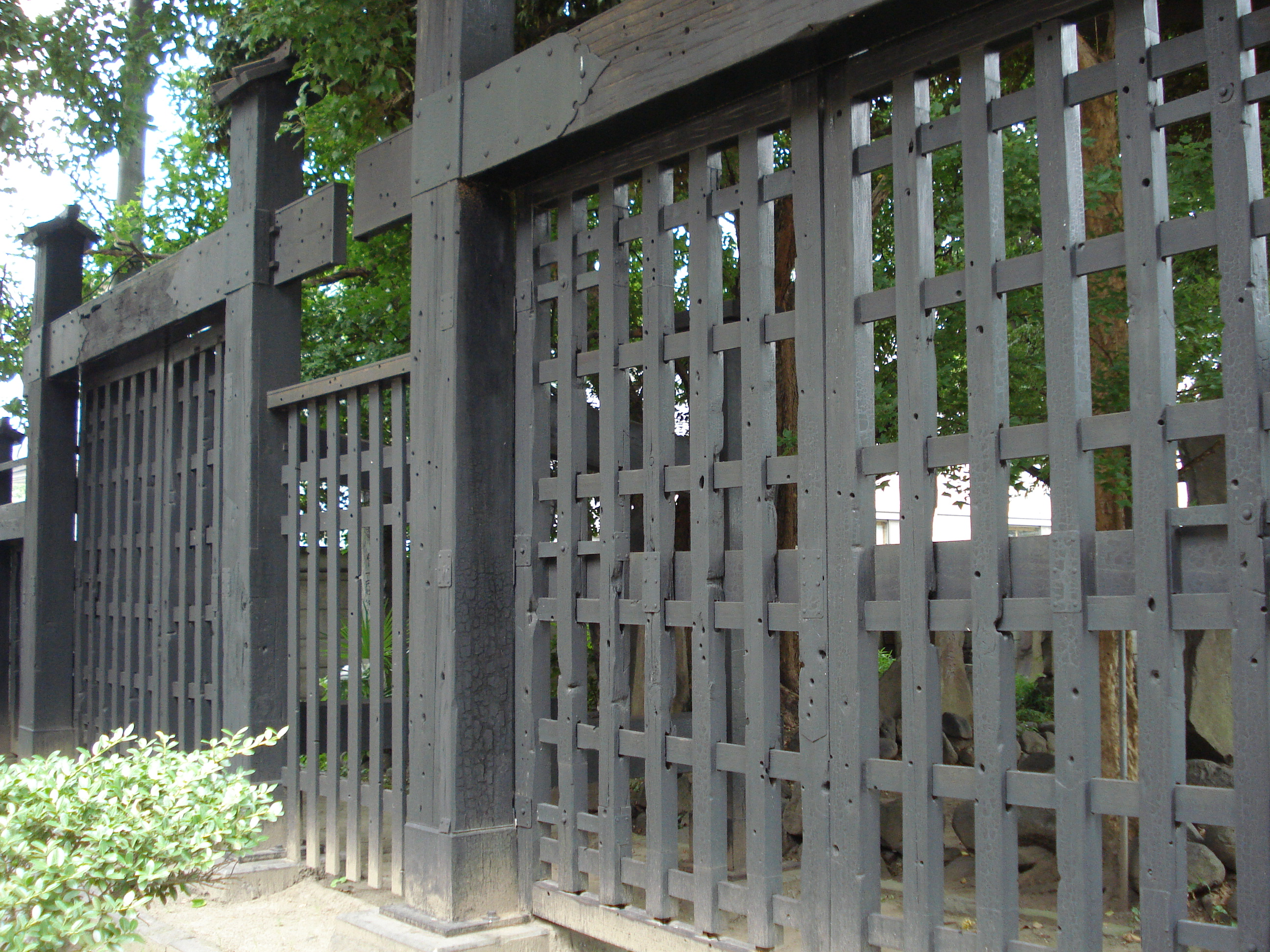 kuromon